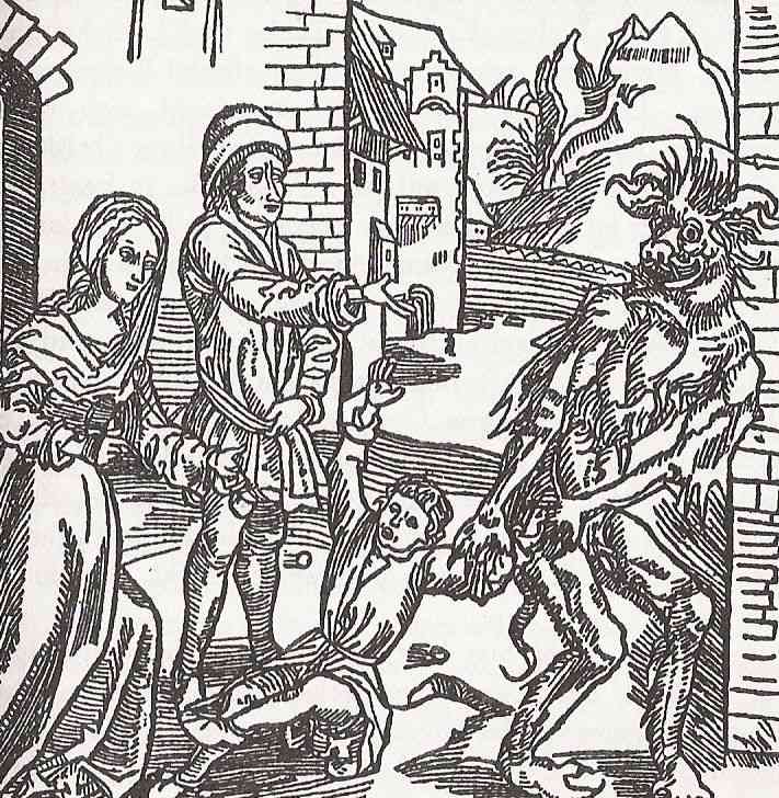 Der Teufel als Kinderräuber, Ritter vom Turn, Basel